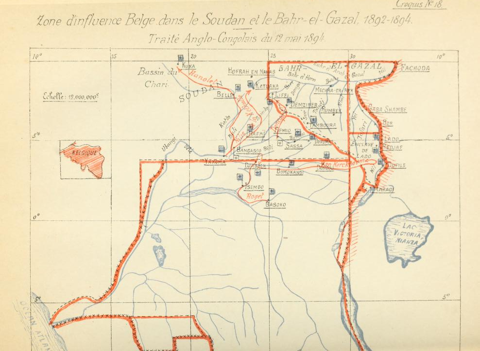 Carte du nord de l' Etat Indépendant du Congo fin du XIX s.